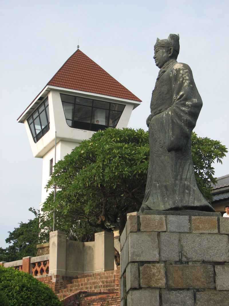 安平古堡裡的鄭成功像。